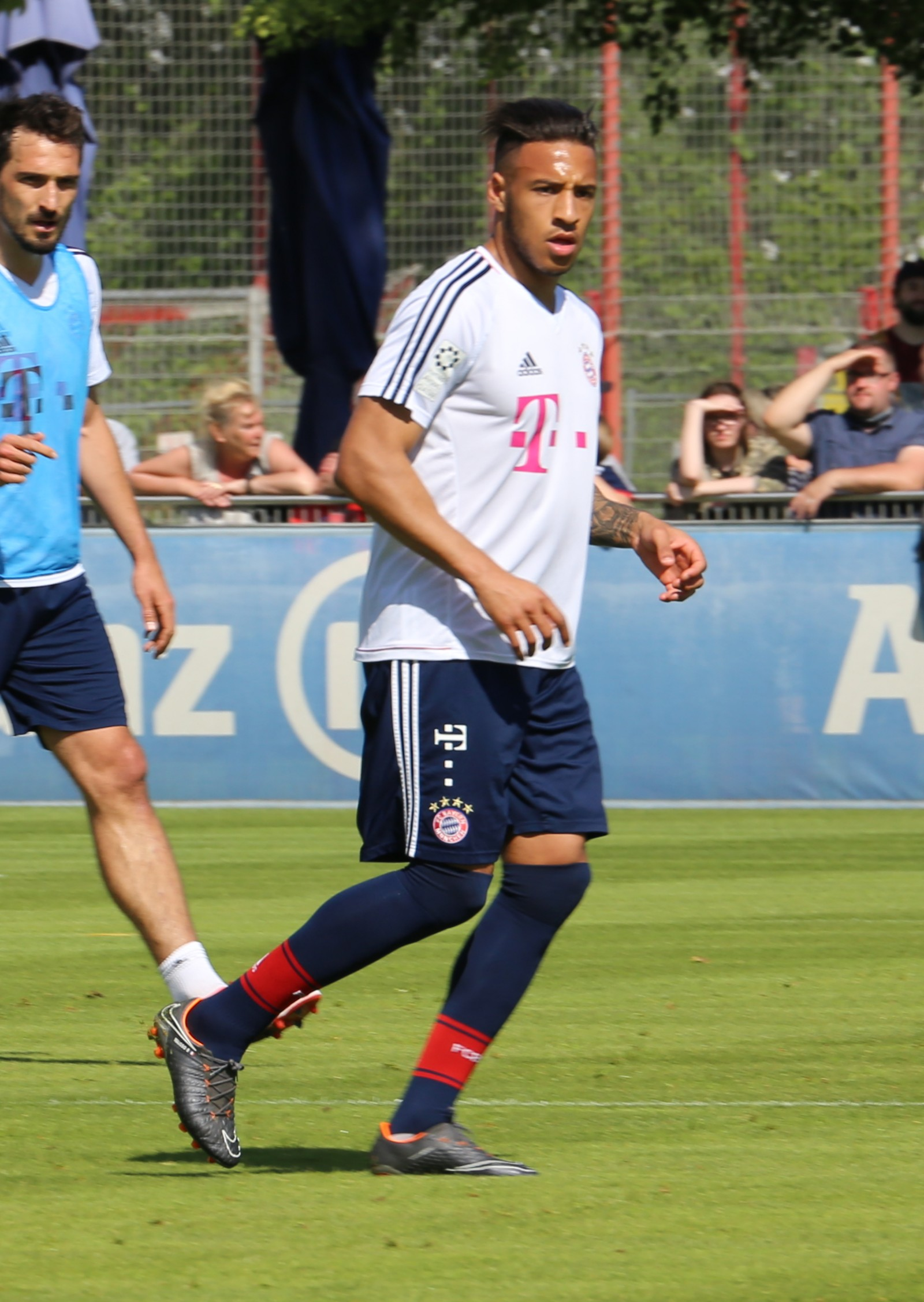 Corentin Tolisso, am 8. Mai 2018 beim Training auf dem Gelände des FC Bayern München